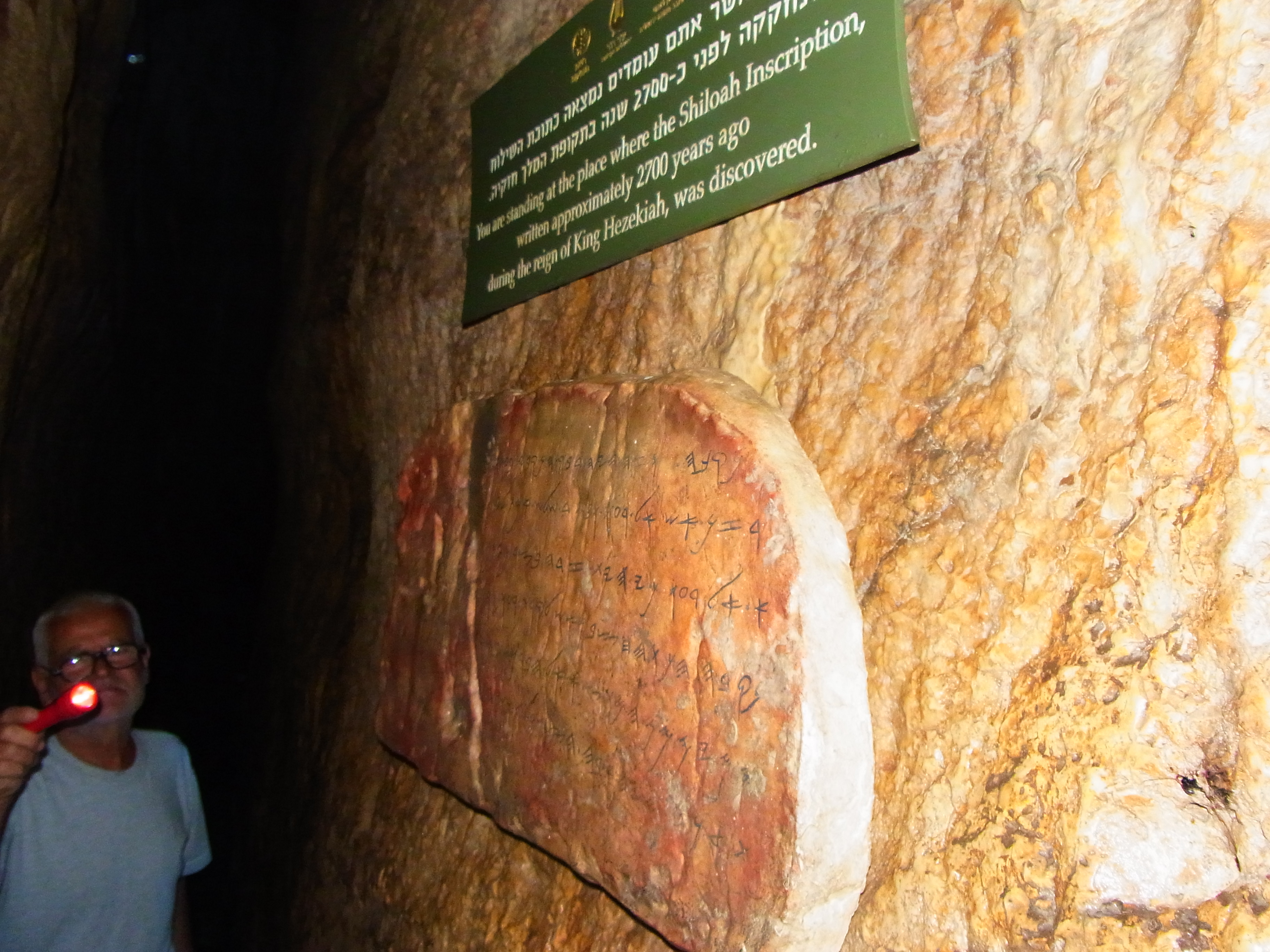 中文（香港）: 猶大王希西家時期的水道碑文與管理員